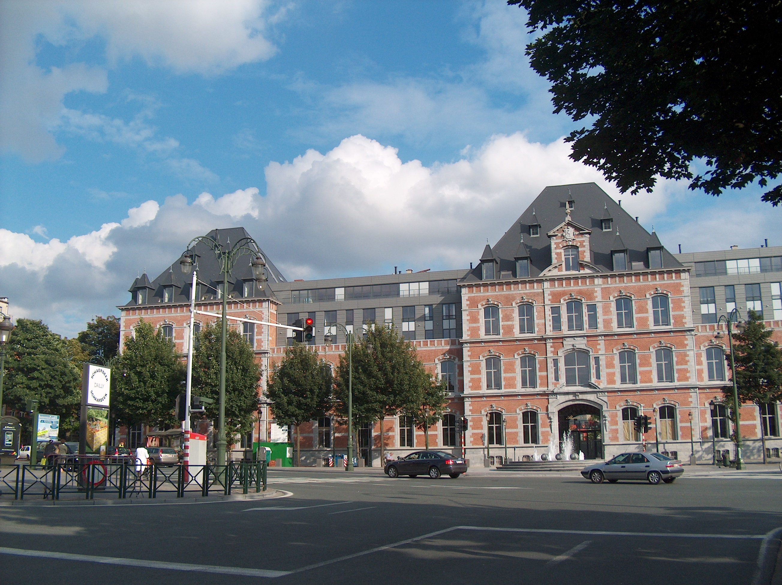 Schaerbeek. Caserne Prince Baudouin place Dailly, Bruxelles, Belgique.